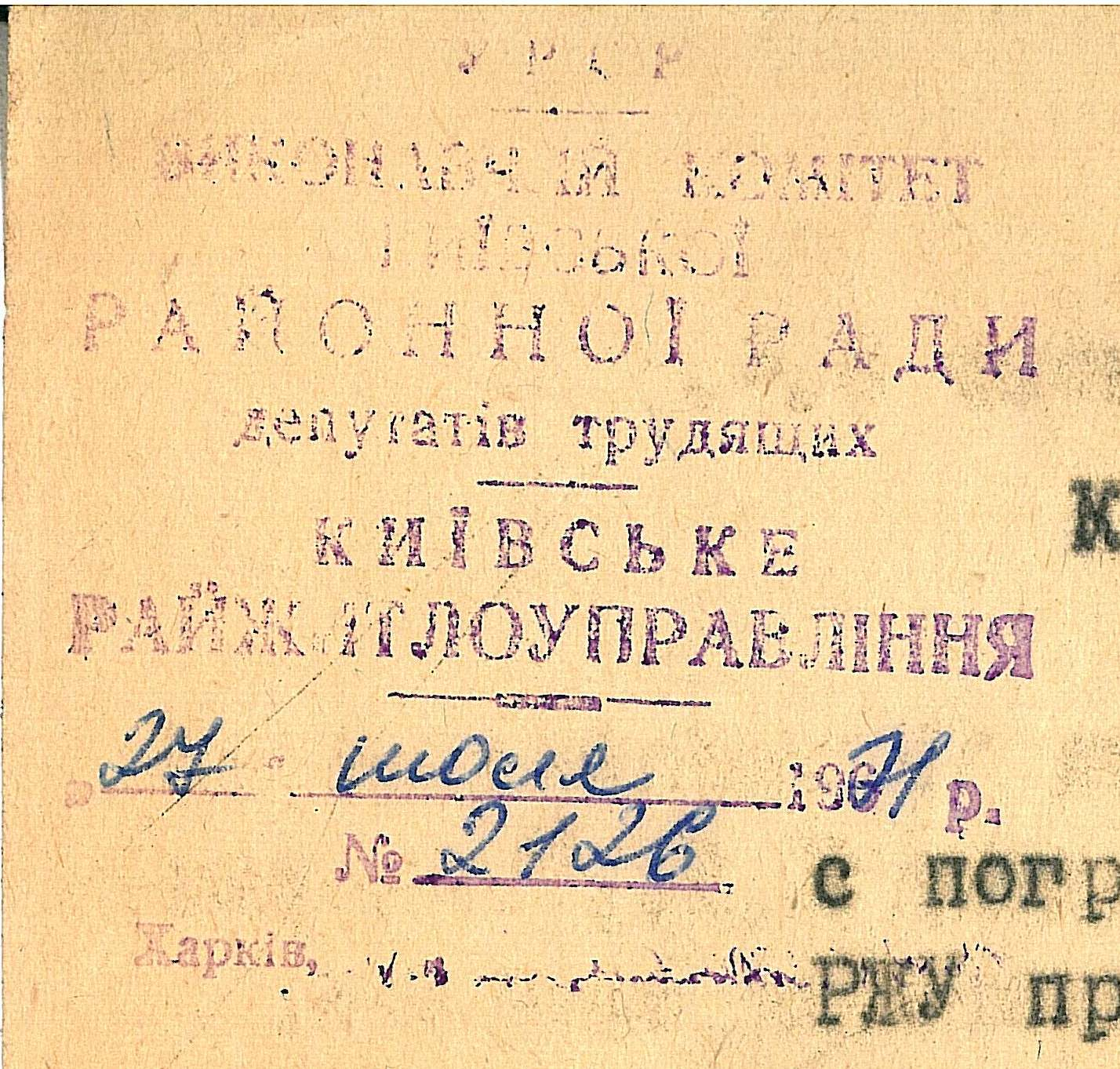 Угловой штамп райжилуправления исполнительного комитета Киевского районного Совета народных депутатов Харькова. СССР.